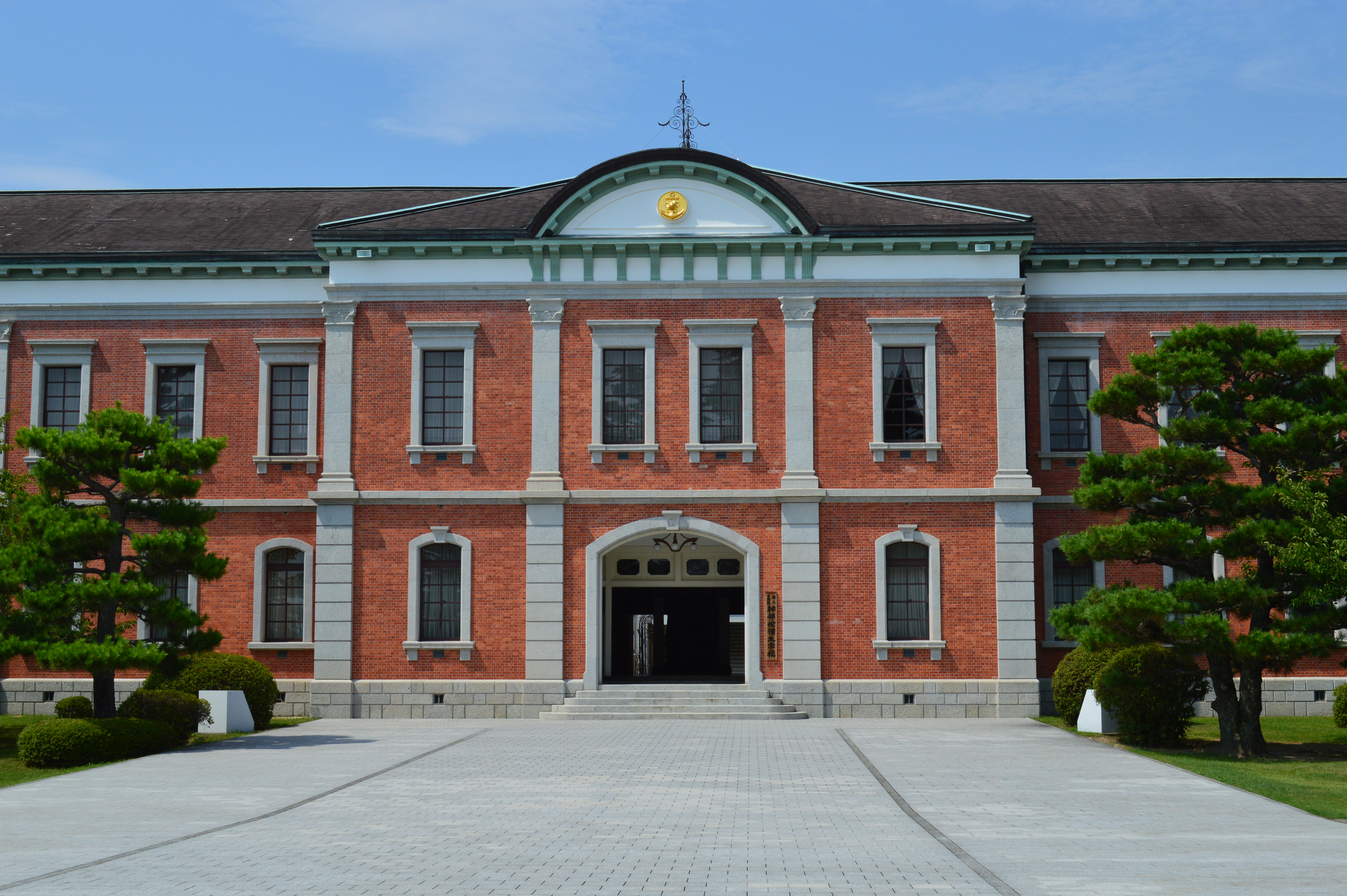 広島県江田島市の海上自衛隊第1術科学校